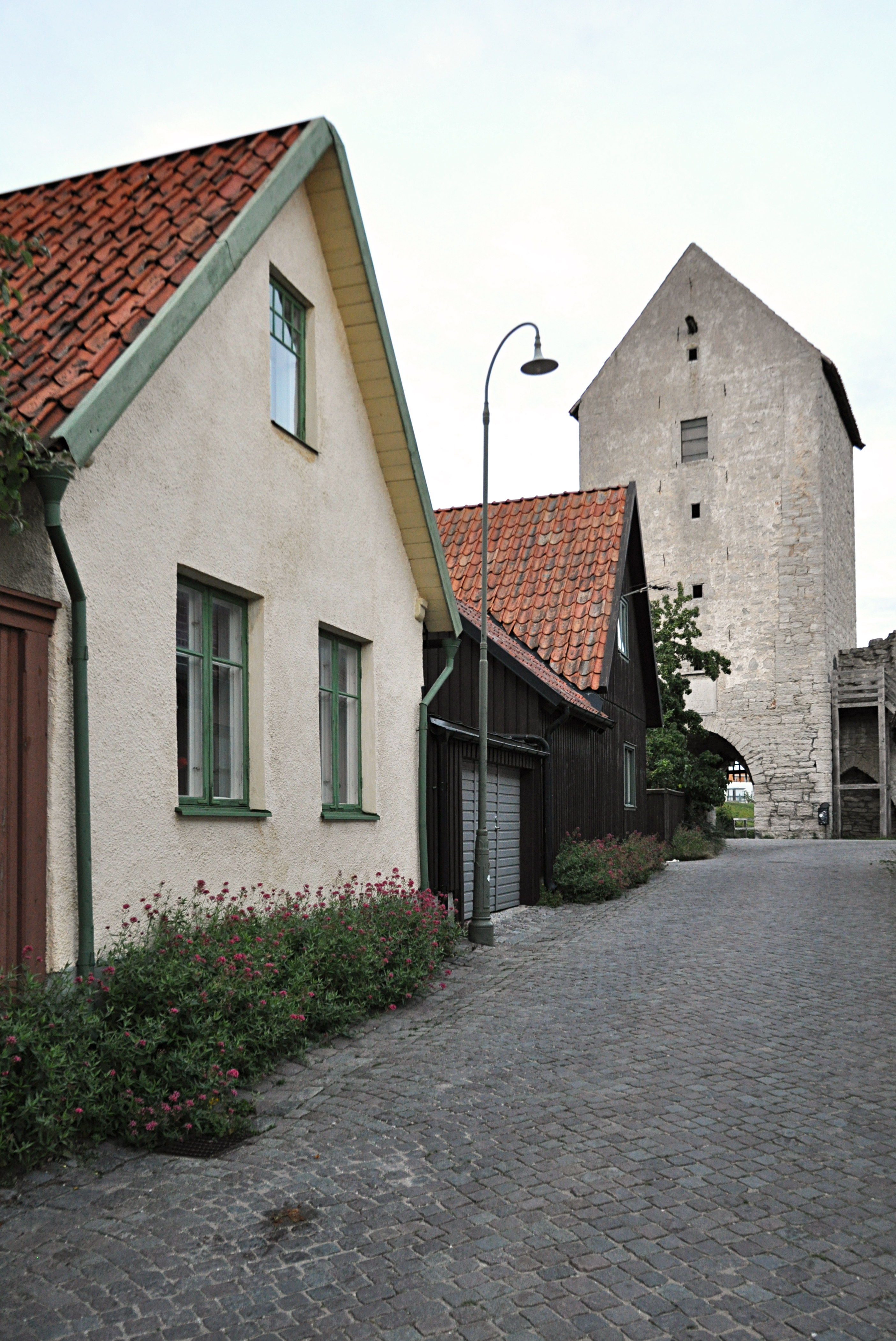 Bommen 5, Uddens gränd 7, närmast i bild (putsade huset), i bakgrunden syns Dalmansporten, Visby